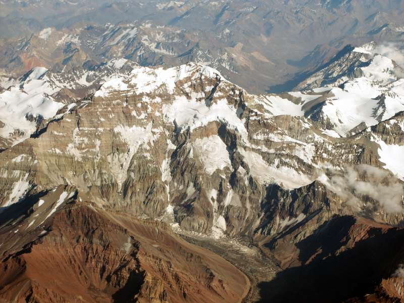 Aconcagua (2004), Jänner 2004